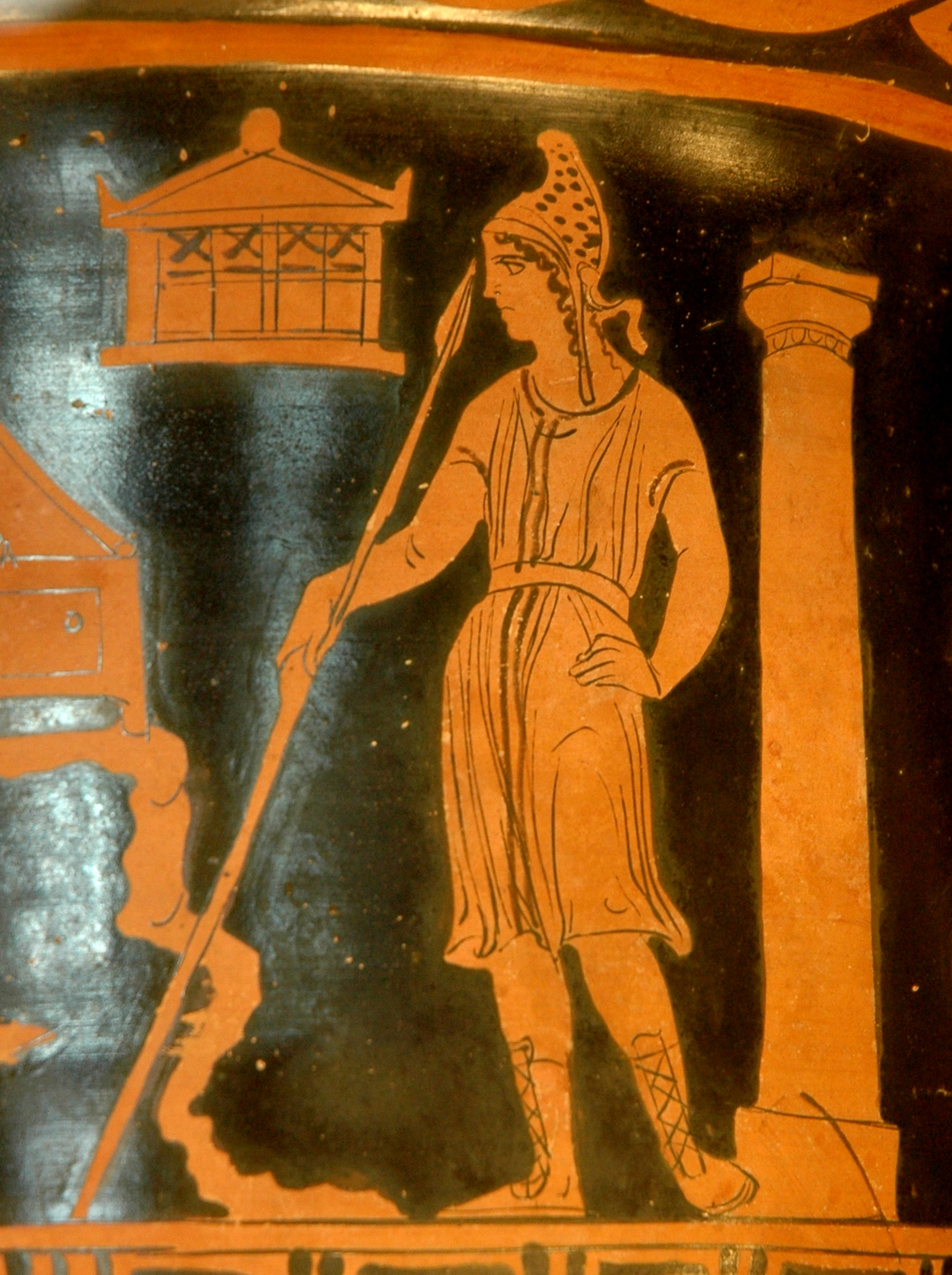 Paris holding a lance and wearing a Phrygian cap. Detail of the side A from an Apulian (Tarentum?) red-figure bell-krater, ca. 380-370 BC.